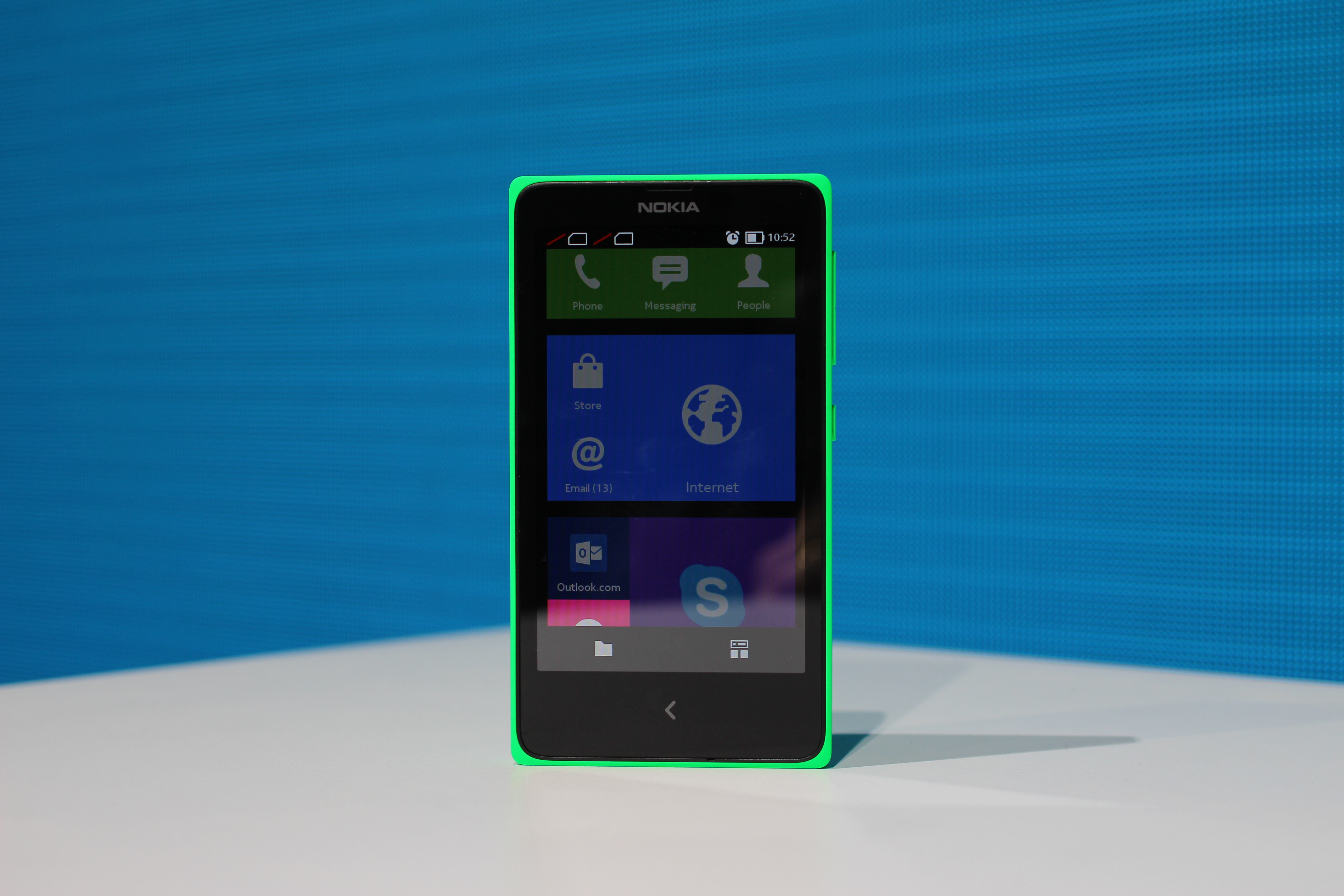 Nokia X